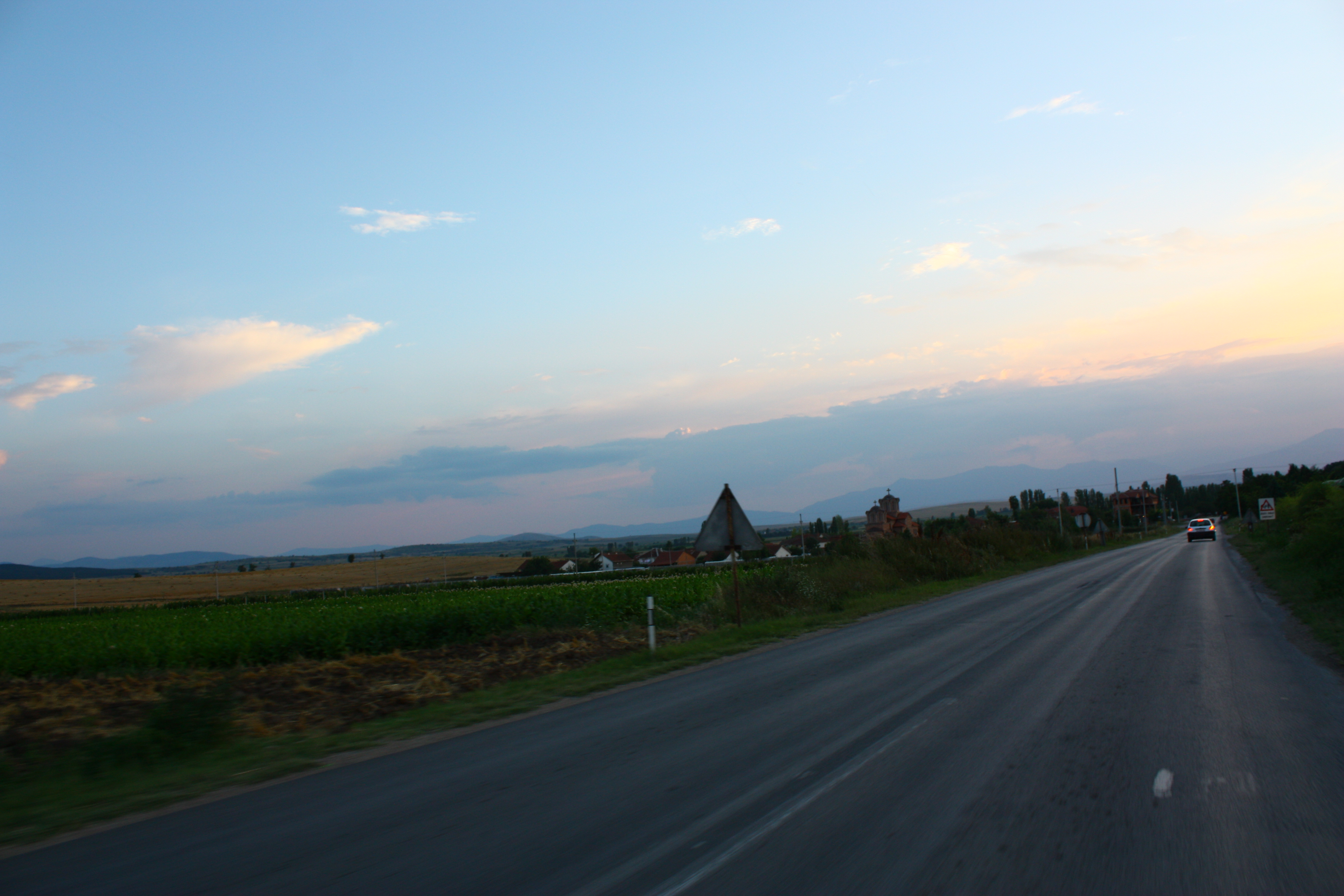 Lozovo, Macedonia